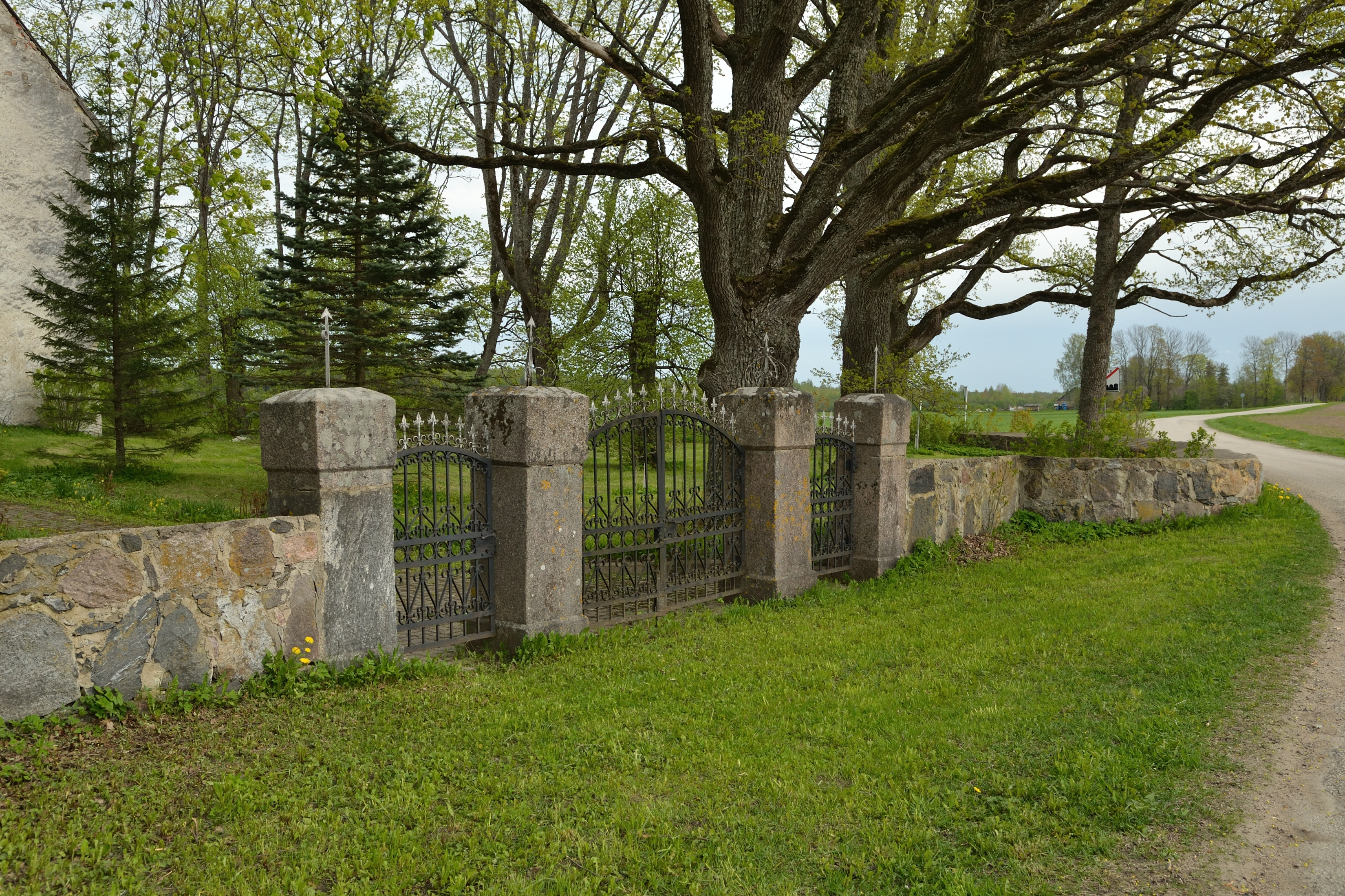 Laiuse kirikuaia piirdemüür